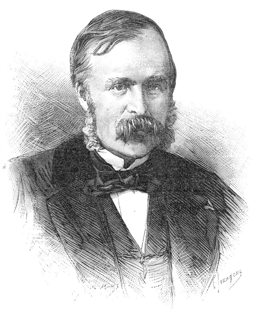 "M. Haentjens, un des fondateurs du Monde illustré, mort à Paris le 11 avril. (Dessin de M. G. Vuillier, d'après la photog. de M. Chalot)".